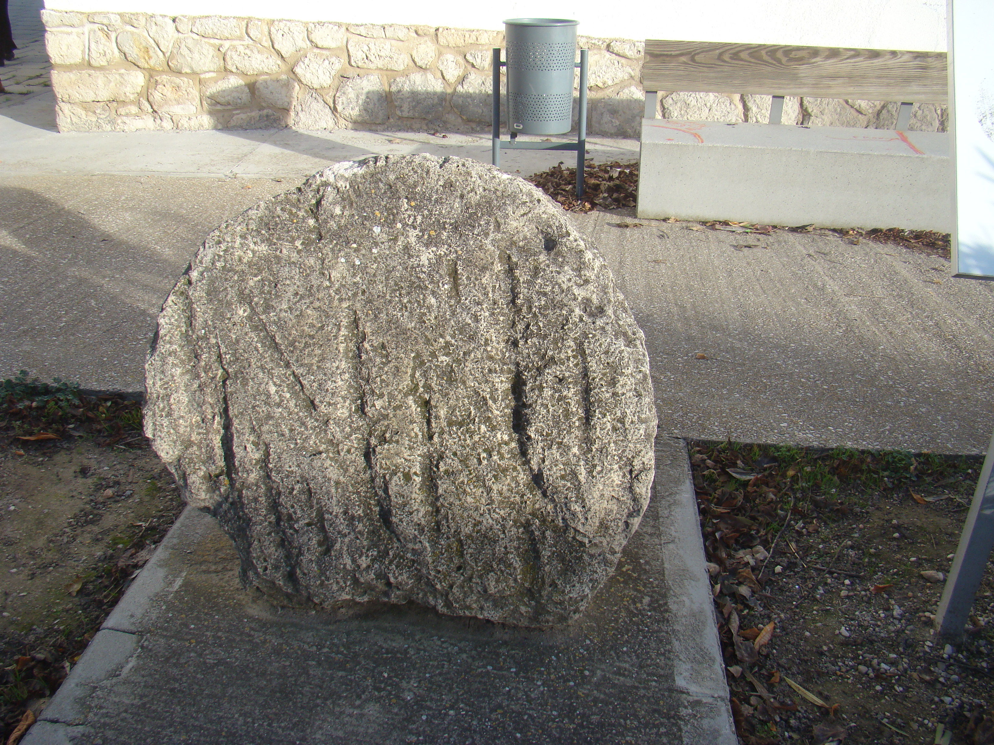 Valoria la Buena (Valladolid, España). Estela probablemente funeraria discoide hallada en el pago de Las Quintanas. Sería tallada entre el siglo III a. de c. y el II de nuestra era. Guarda relación con otras halladas en necrópolis de ciudades vacceas. Estos discos de piedra se situaban sobre la superficie de la tumba, en la que se enterraban los restos incinerados de una persona. Por su tamaño tuvo que dedicarse a la memoria de un personaje de cierta importancia también ocasionalmente se utilizaron para señalar el trazado de vías y caminos